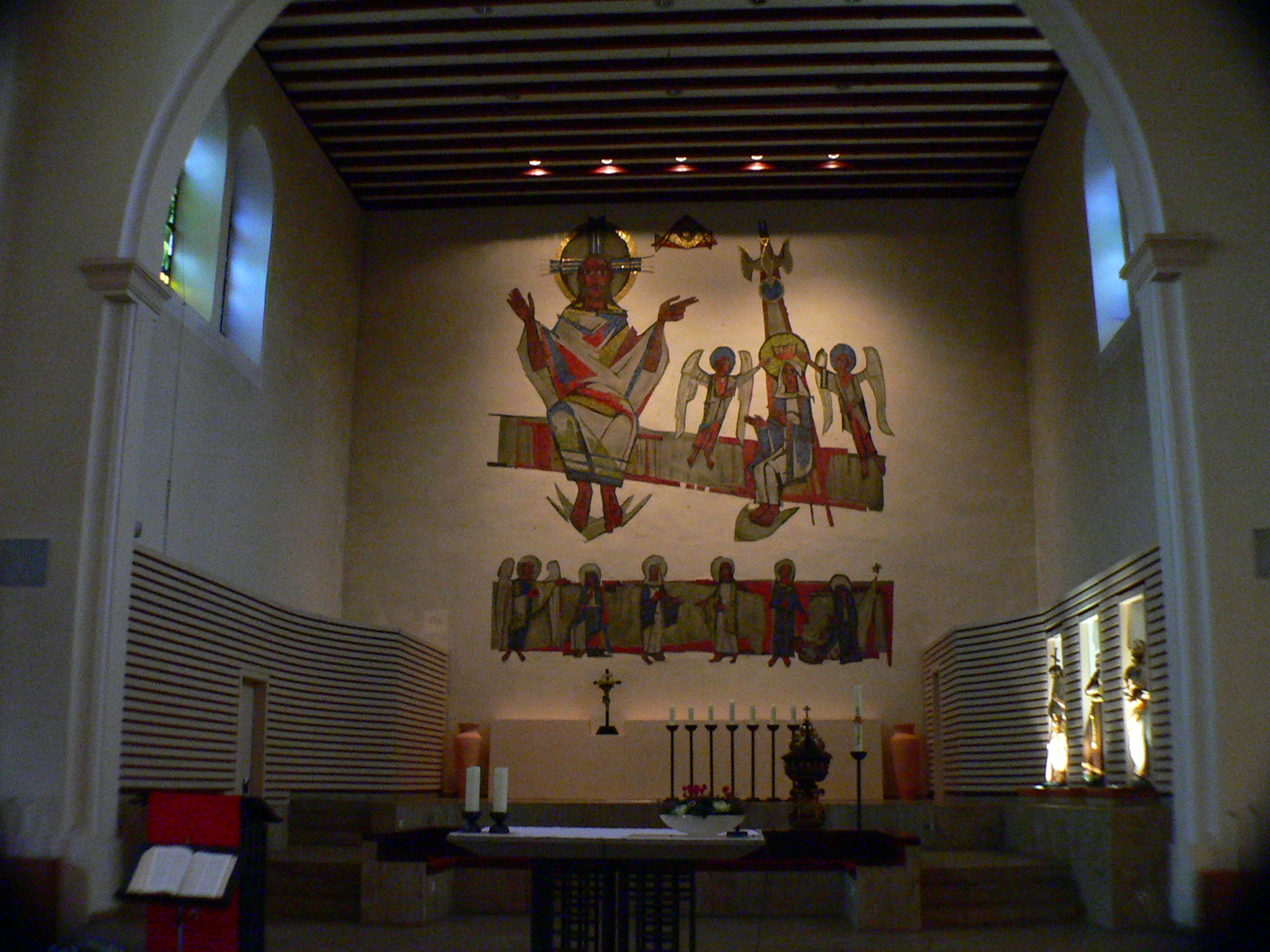 Kath. Pfarrkirche St. Marien in Quakenbrück, Deutschland - Altarraum